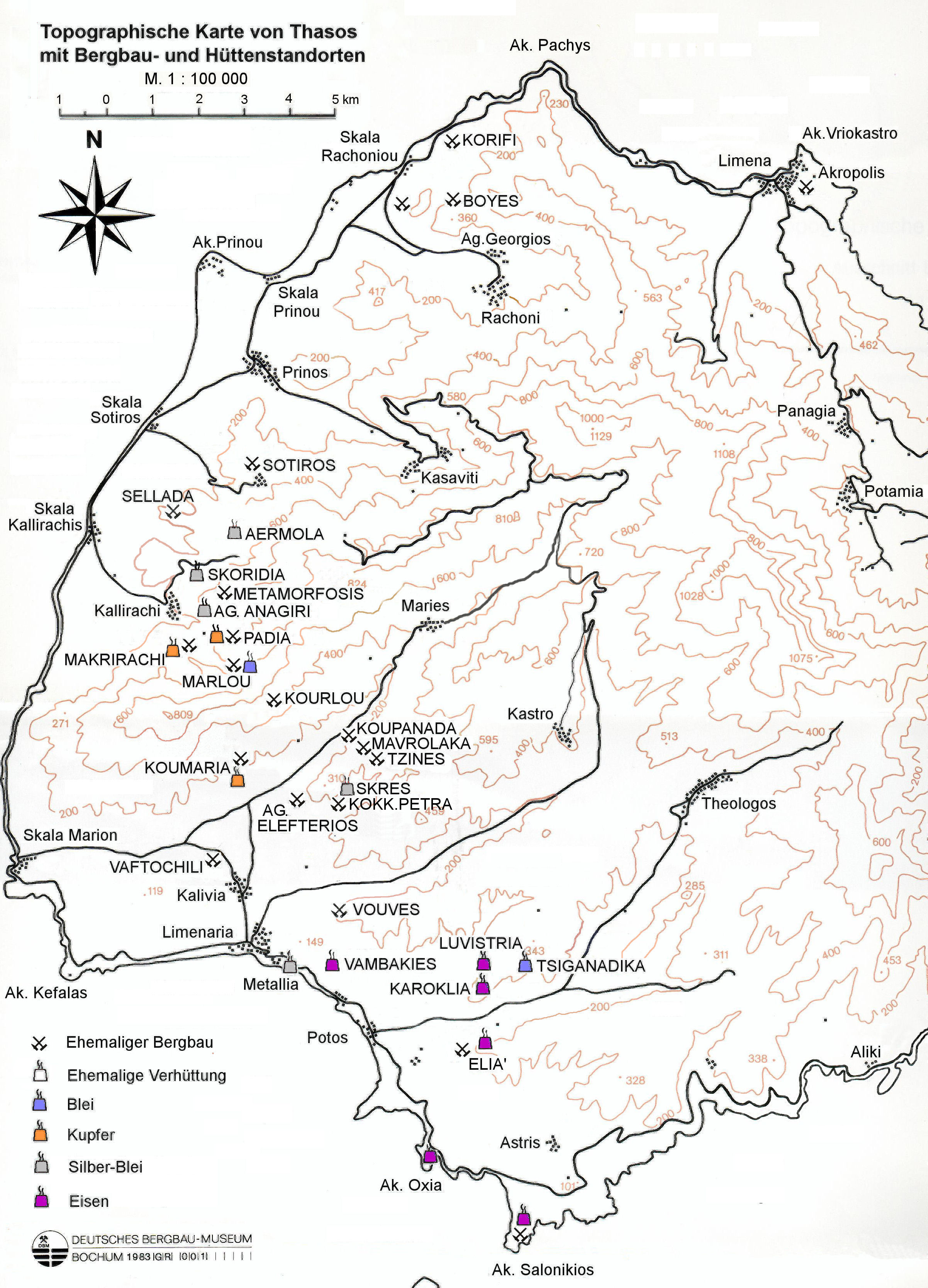 Standorte Erzverhüttung und Bergbau auf der Insel Thasos